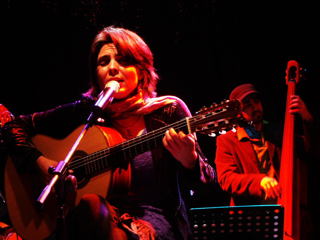 8 Agosto 09 Santiago, Chile